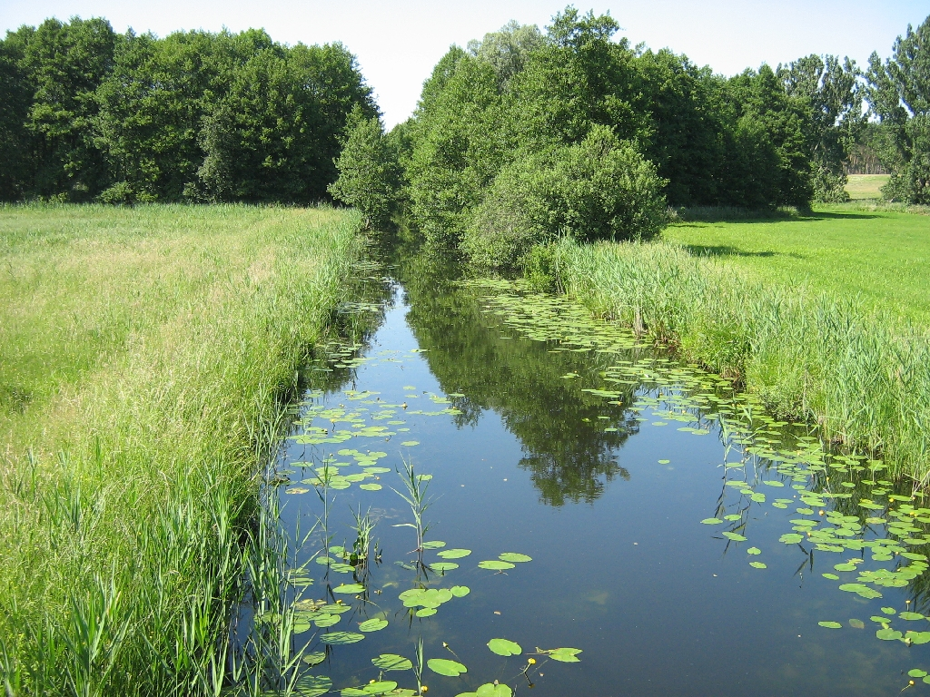 die Havel zwischen Babke und Blankenförde in der Mecklenburgische Seenplatte (Landkreis Mecklenburg-Strelitz, Mecklenburg-Vorpommern, Germany).